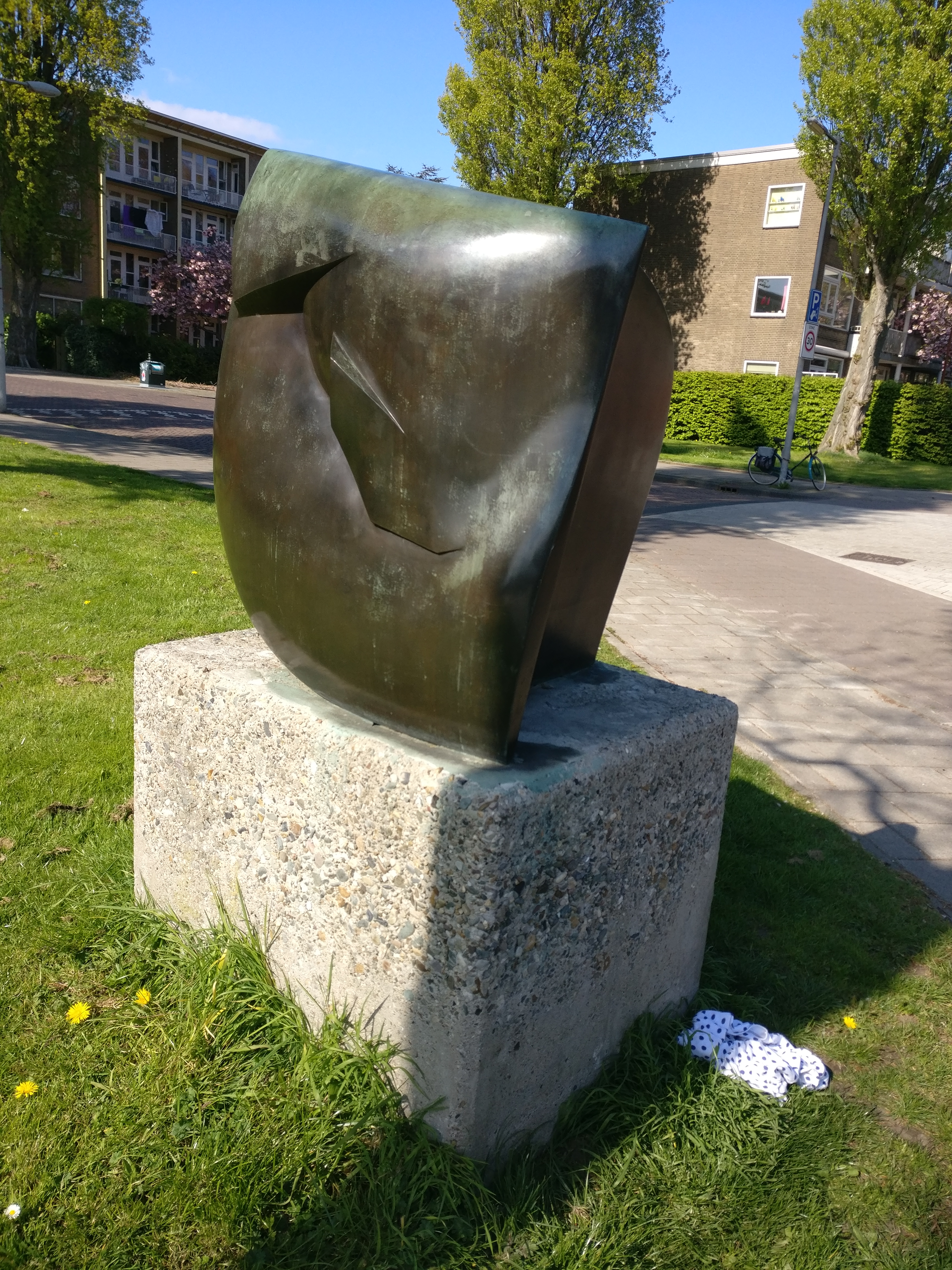 Plastiek cruising Radioweg, Kruislaan, Amsterdam